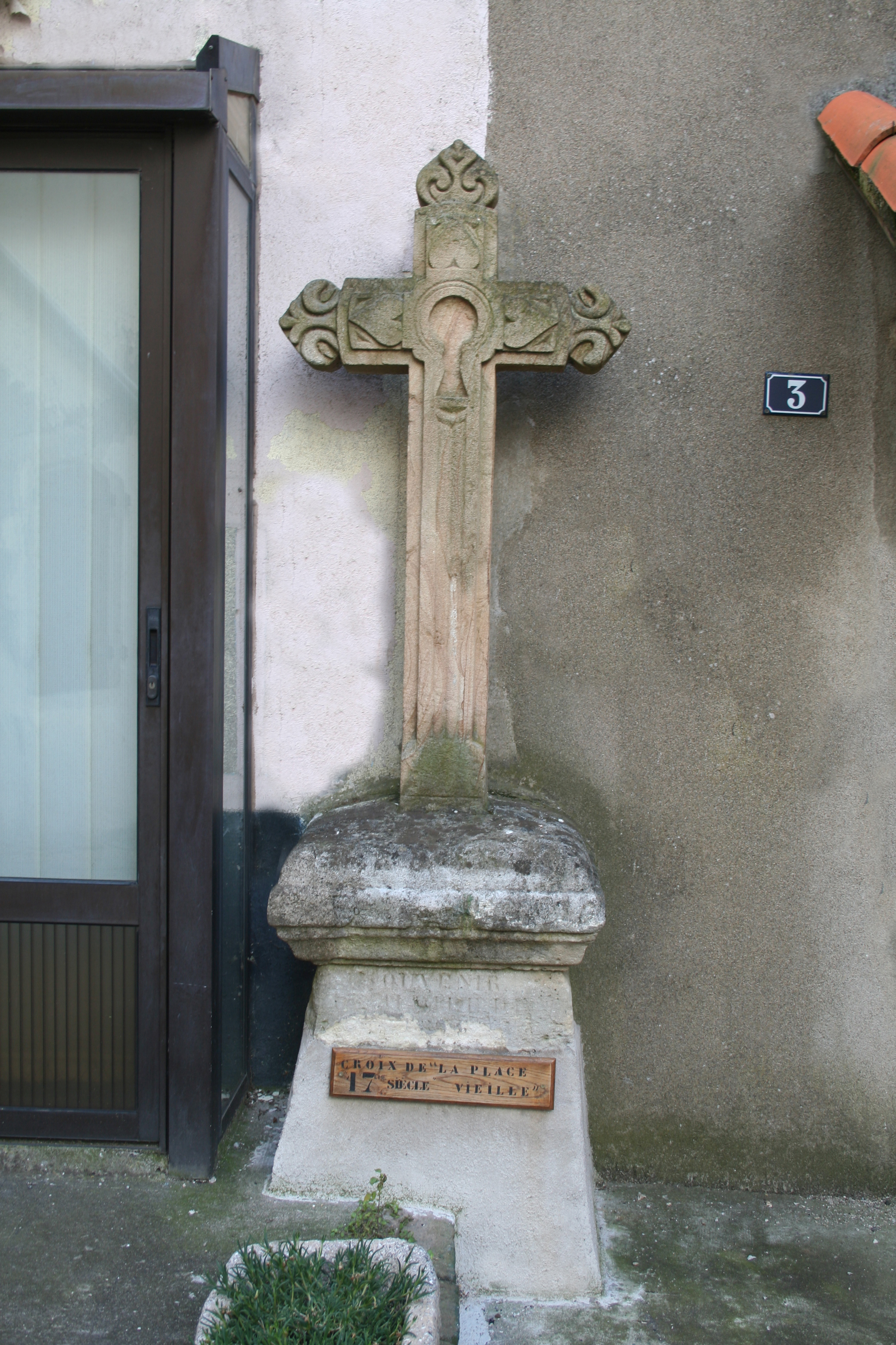 Graissessac (Hérault) - croix du XVIIe siècle.